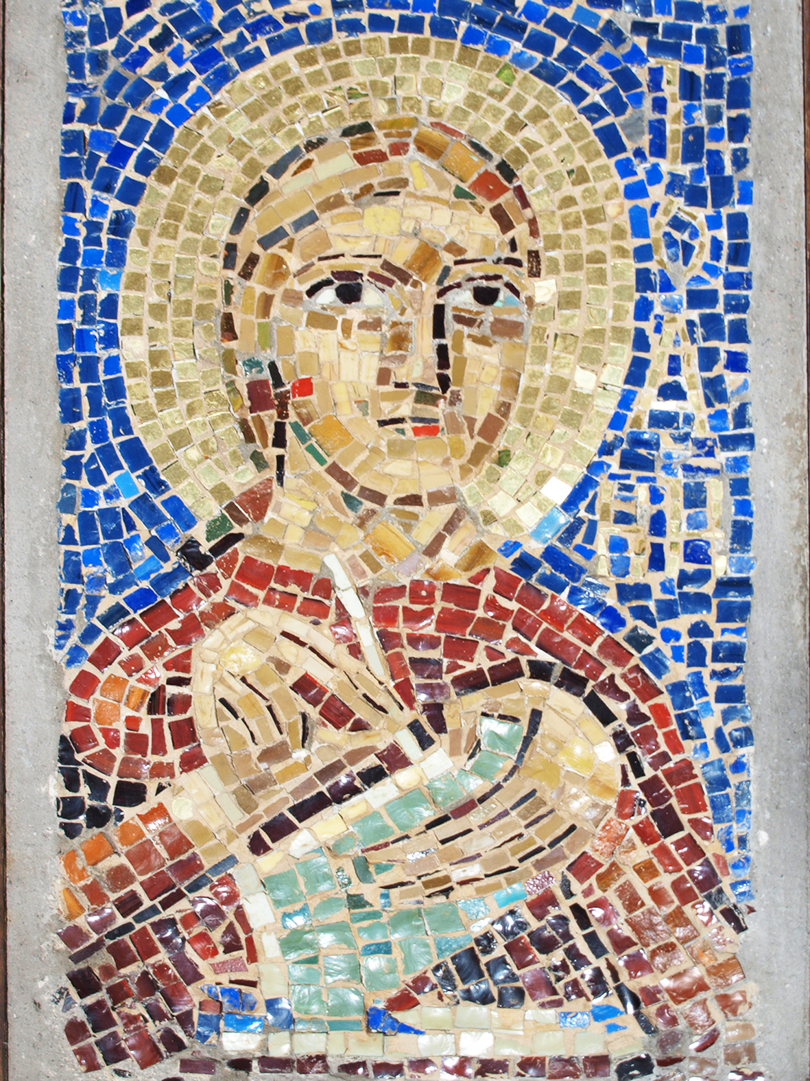 Мозаїка Святий Іоан, 1910. Приватна колекція.